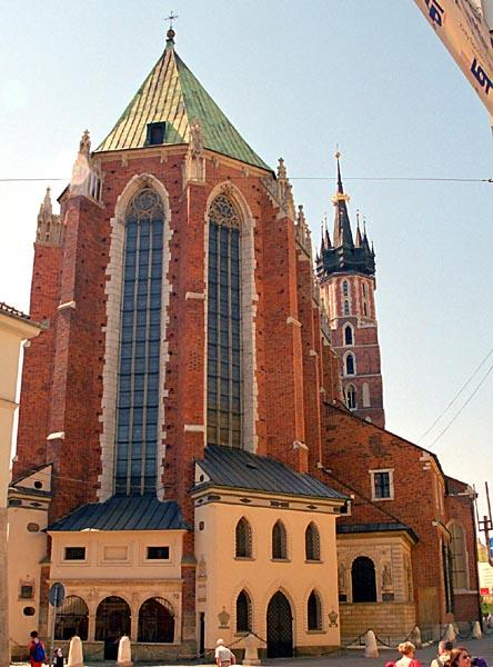 Krakow (Poland) St Mary Church